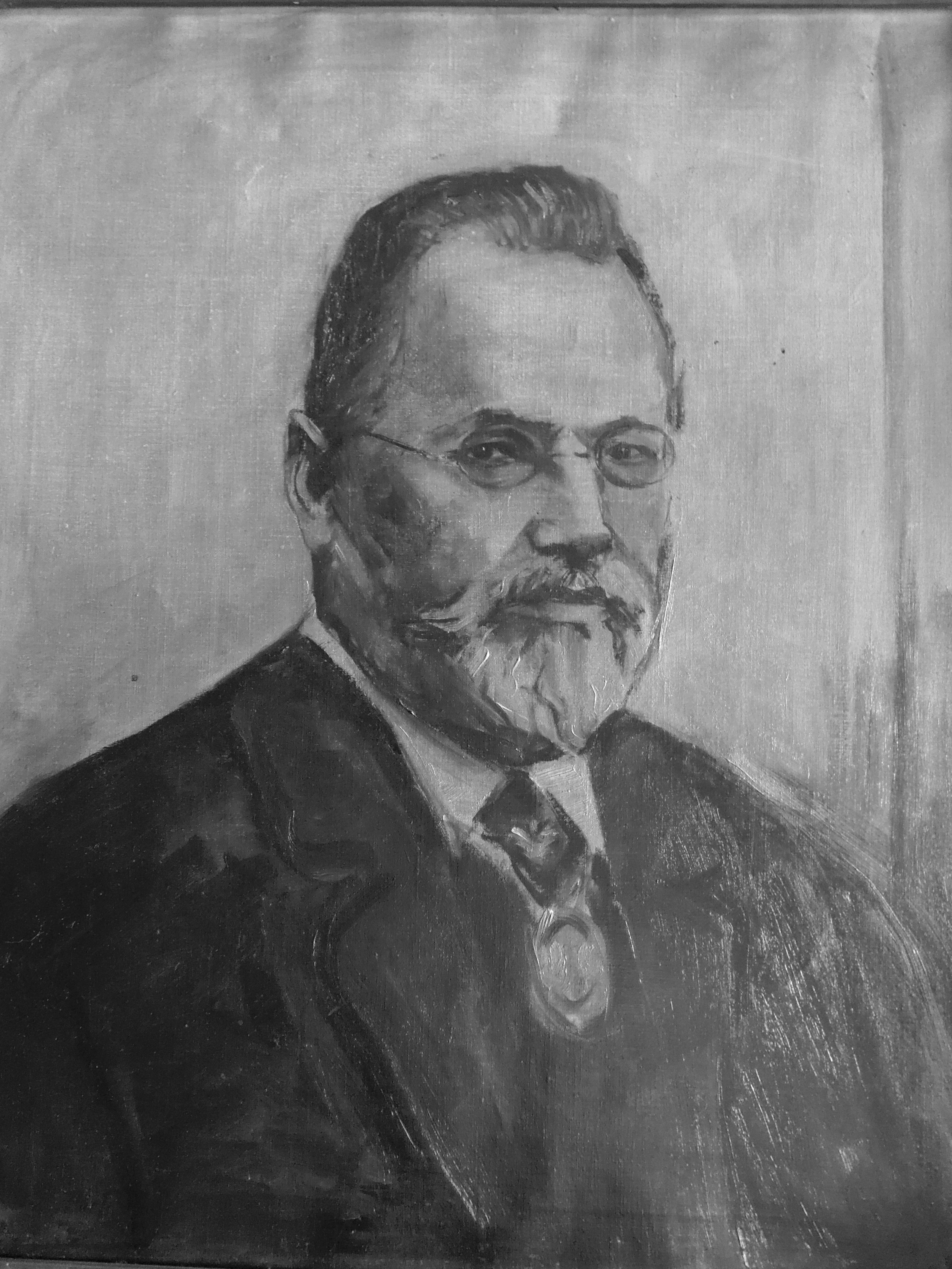 Das Gemälde zeigt den Ingenieur Ernst Purschian und wurde von seiner Tochter Doramaria Purschian geschaffen.